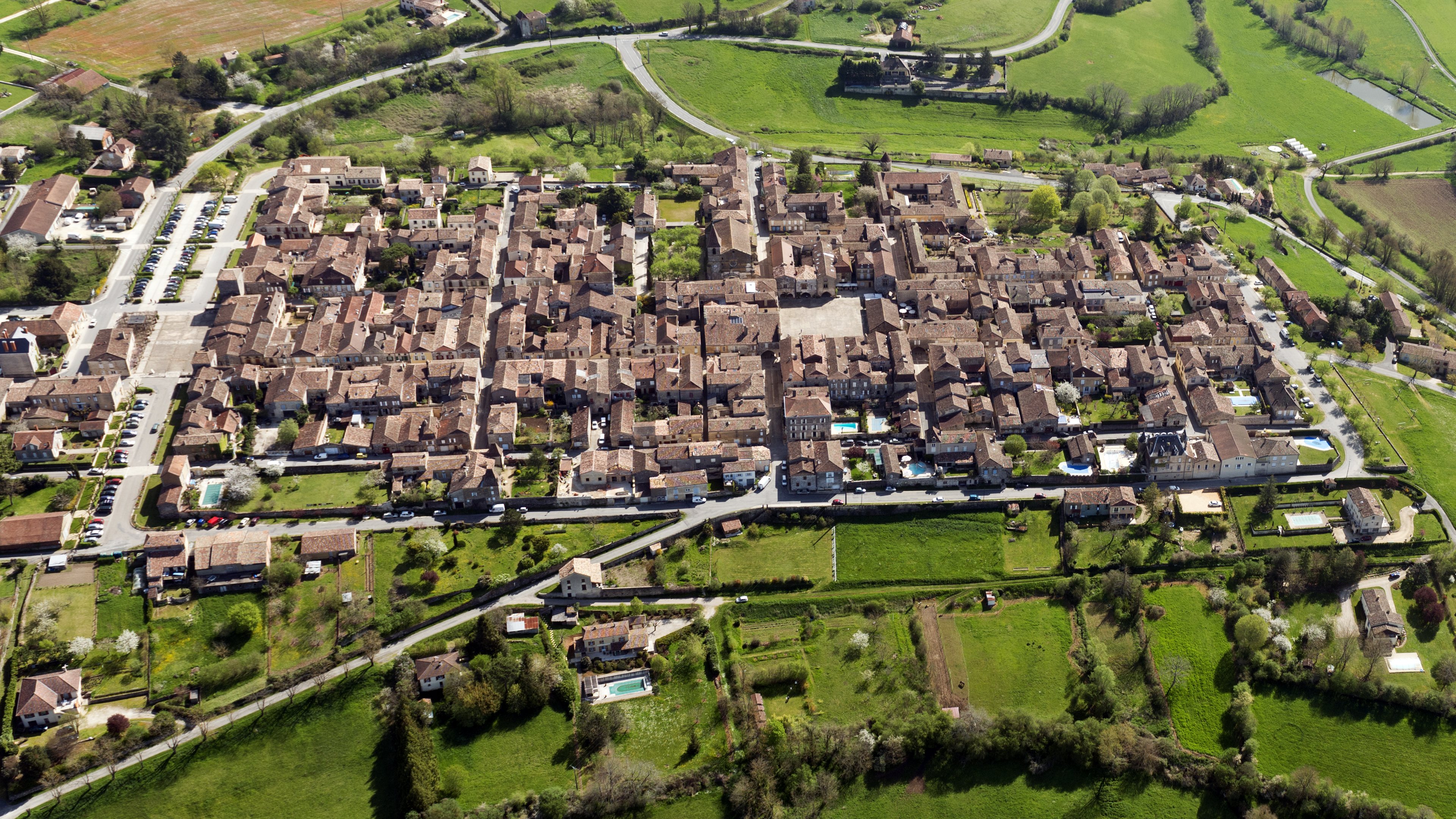 Vue aérienne